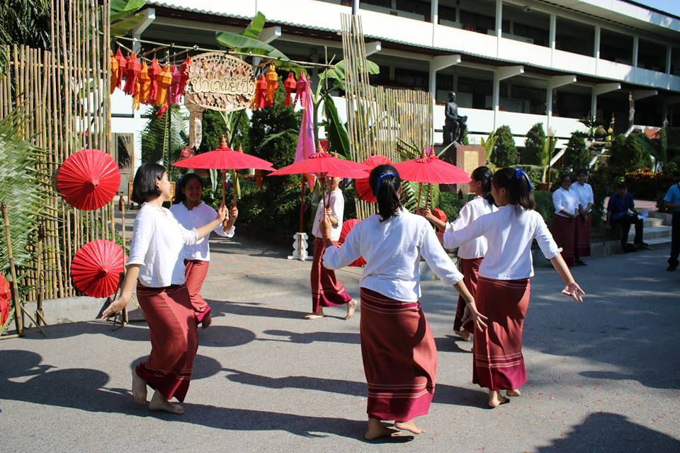 งานประเพณียี่เป็ง(ลอยกระทง) โรงเรียนสันป่าตองวิทยาคม